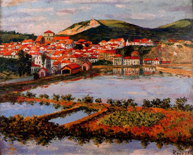 Plencia